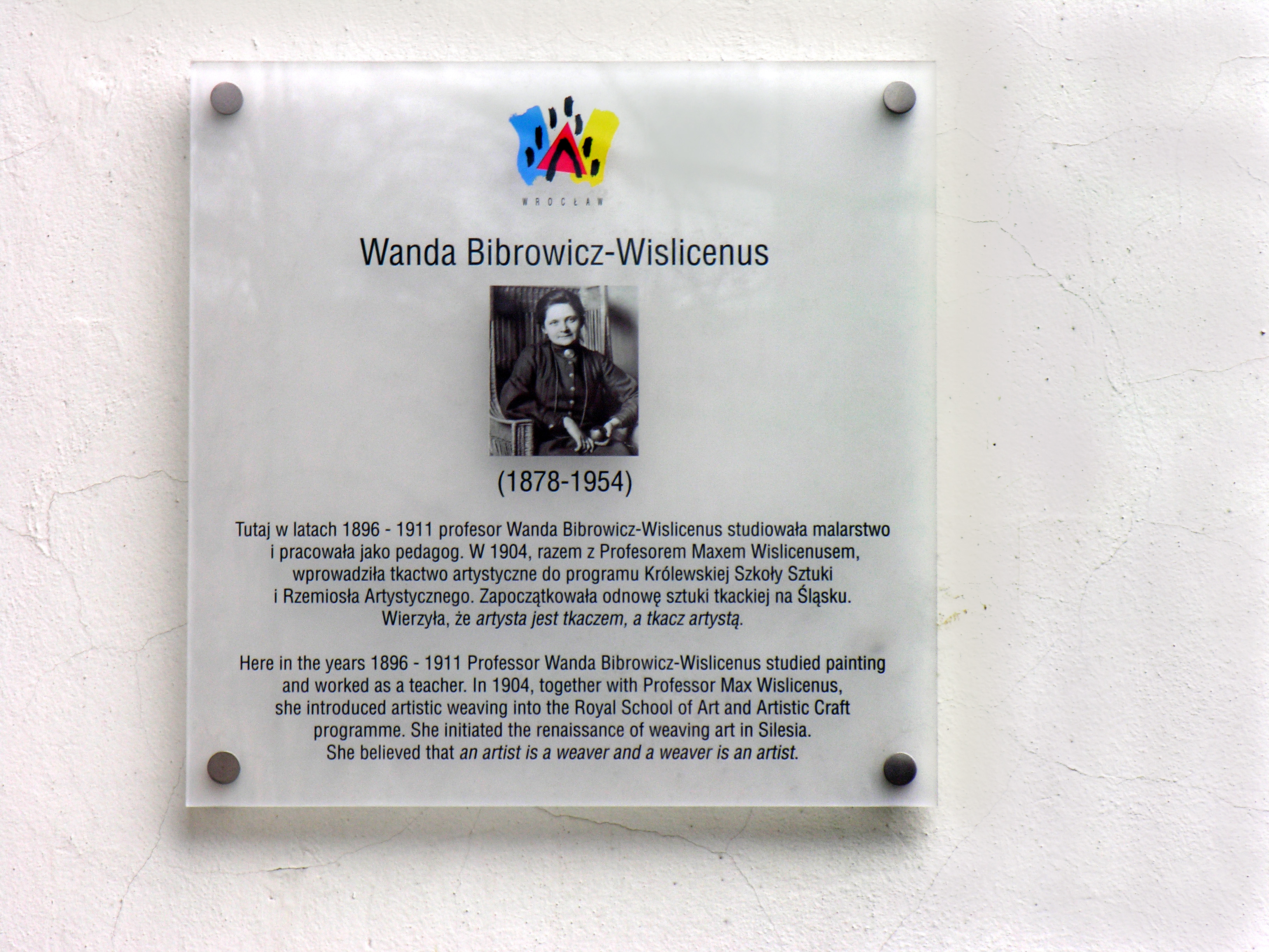 Tablica ku czci Wandy Bibrowicz-Wislicenus na budynku Państwowej Wyższej Szkoły Sztuk Plastycznych, Wrocław, Plac Polski